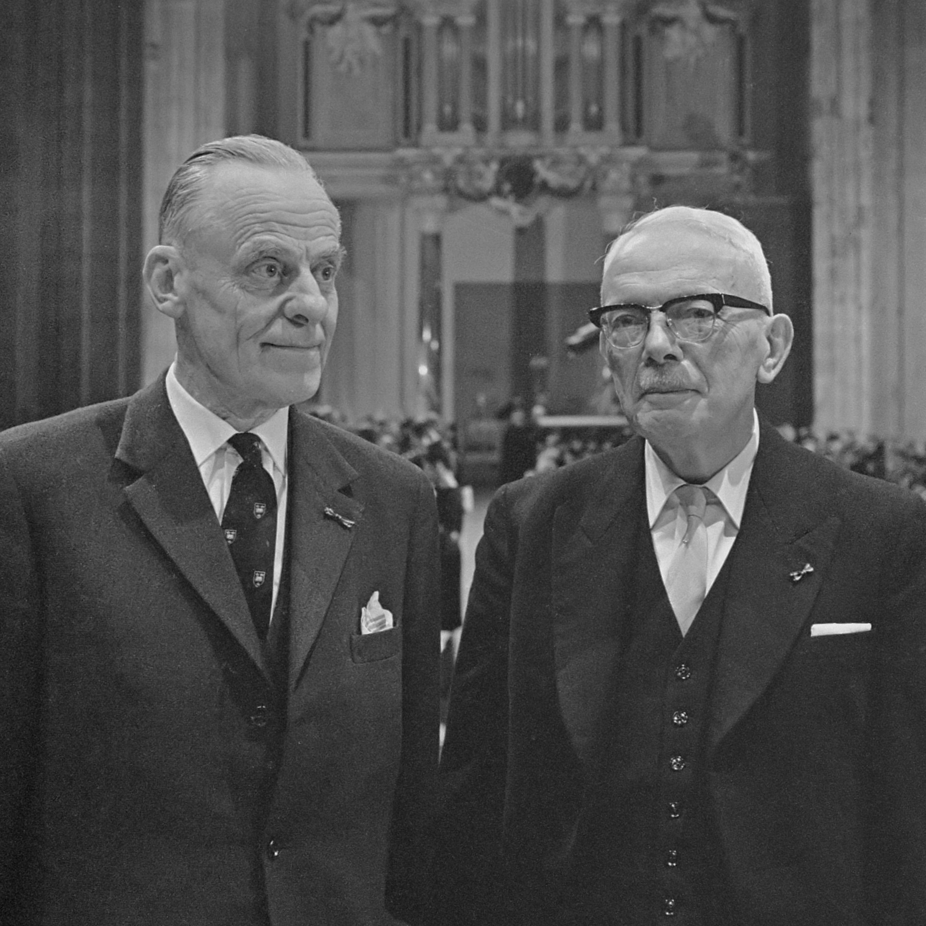 NCRV 40-jarig bestaan herdacht in Eusebiuskerk te Arnhem, links dr. W. A. Visser t Hoogt en rechts mr. A. B. Roosjen (voorzitter NCRV) 9 november 1964